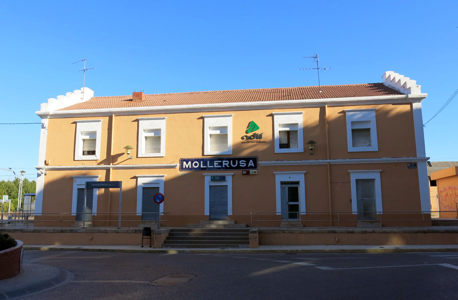 Estació del Nord (Mollerussa)